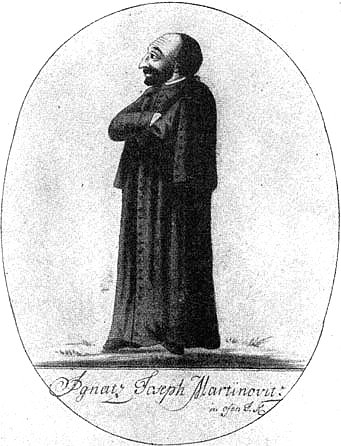 Martinovics Ignác szászvári apát. Kivégzése idején Budán készült vízfestmény.